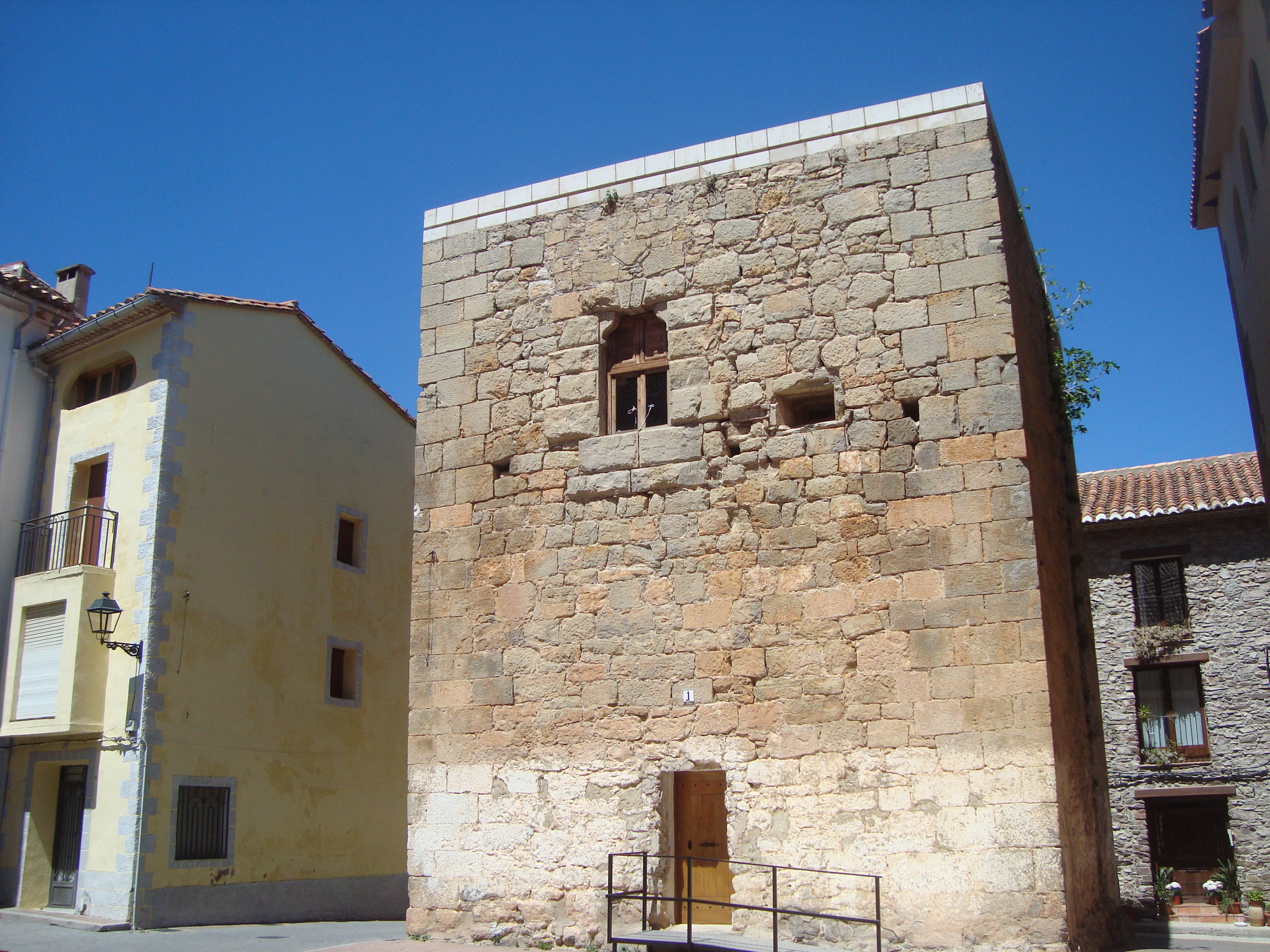 Torre del Palau dels Comtes de Cirat (Cirat)